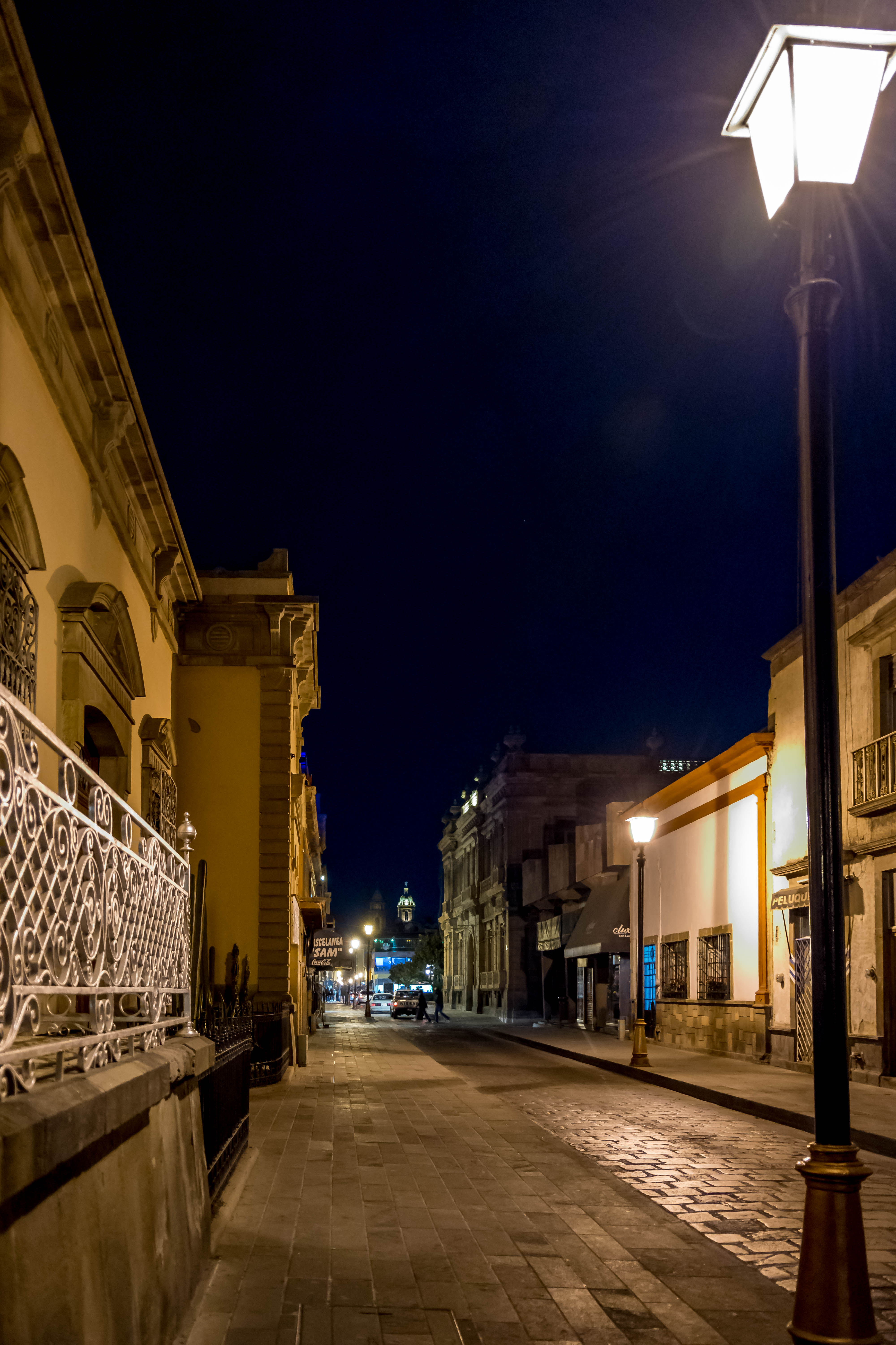 Calle de San Agustín con vista hacia la plaza del carmen